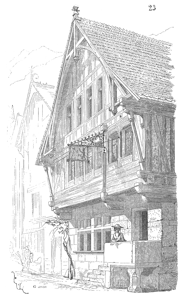 ... Les constructions de maisons par empilages sont mieux caractérisées si nous nous rapprochons des Alpes, Nantua (Ain), on voit encore quelques maisons à peu près de la même époque que celle d'Annonay, donnée ci-dessus, mais dont la structure se rapproche davantage de celle des habitations suisses dites châlets. On retrouve dans ces maisons (23) des traditions fort anciennes. La manière dont les pans de bois du premier étage sont posés sur la maçonnerie, les sablières doublées sous le comble, appartiennent tout à fait à des constructions primitives de certaines peuplades qui n'employaient que le mode de charpente par empilage, tandis que le tracé de la ferme de face formant auvent et certaines parties des pans de bois se rapprochent des charpentes assemblées si fréquentes dans le nord de la France. Il faut se hâter de faire une étude complète et critique de ces vieux débris des habitations du sol des Gaules, car cette étude peut puissamment aider au classement des races répandues sur ce territoire. Les édifices religieux et les châteaux se sont élevés sous des influences souvent étrangères au sol où nous les trouvons aujourd'hui, tandis que les maisons ont conservé très-tard les traditions primitives des populations indigènes ...